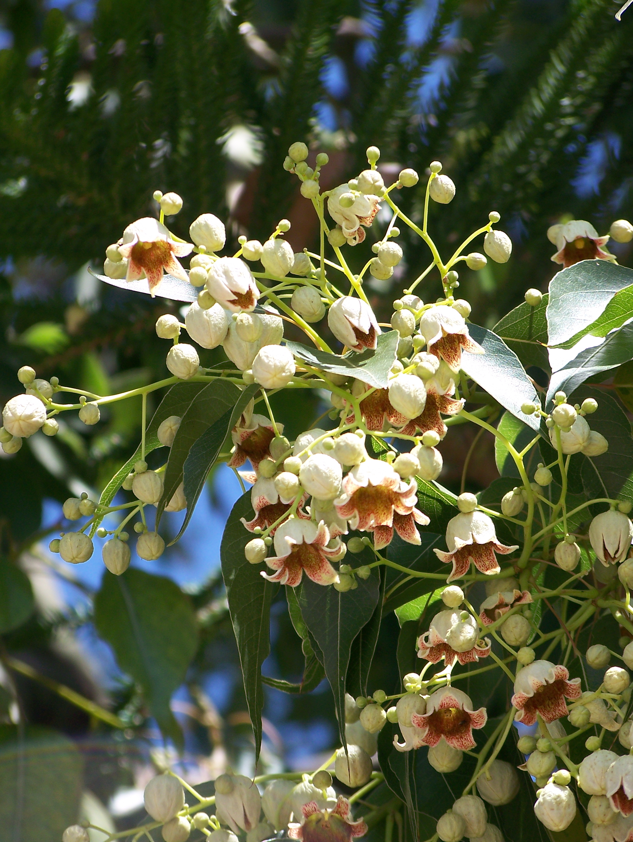 Brachychiton populneus : Rama con flores en diversos estadios de floración - Avenida de la Libertad, Albatera (Alicante, España).